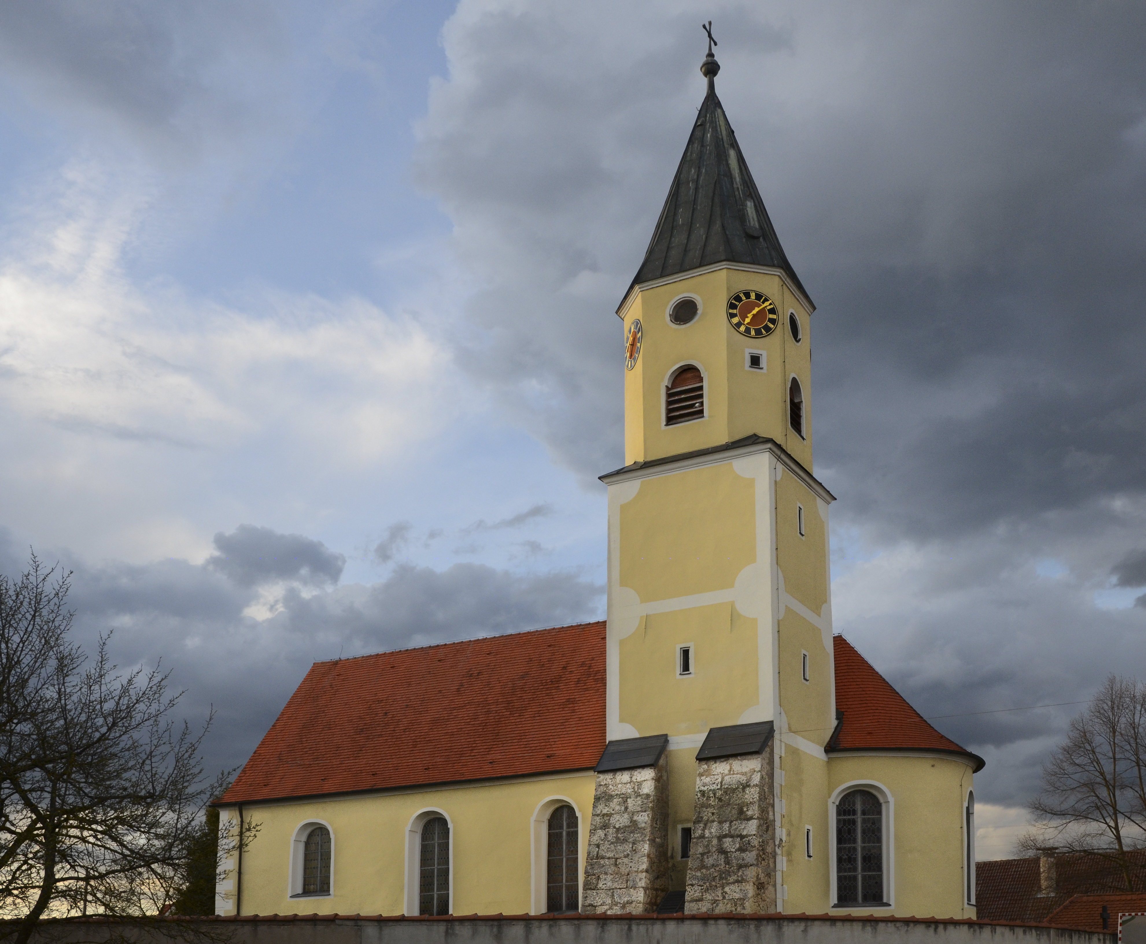 evang.-luth. Kirche St. Peter und Paul in Grosselfingen